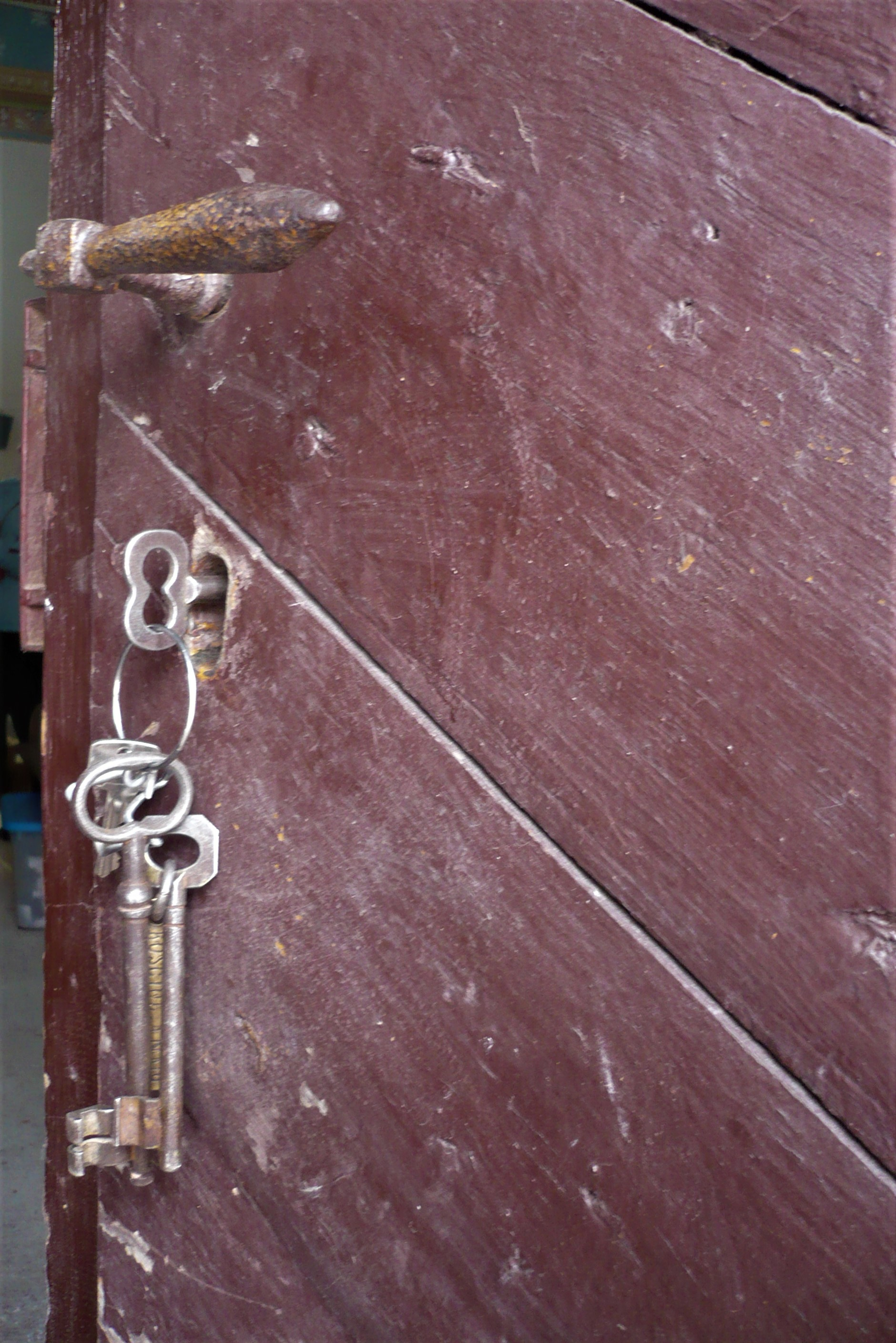 Klucze